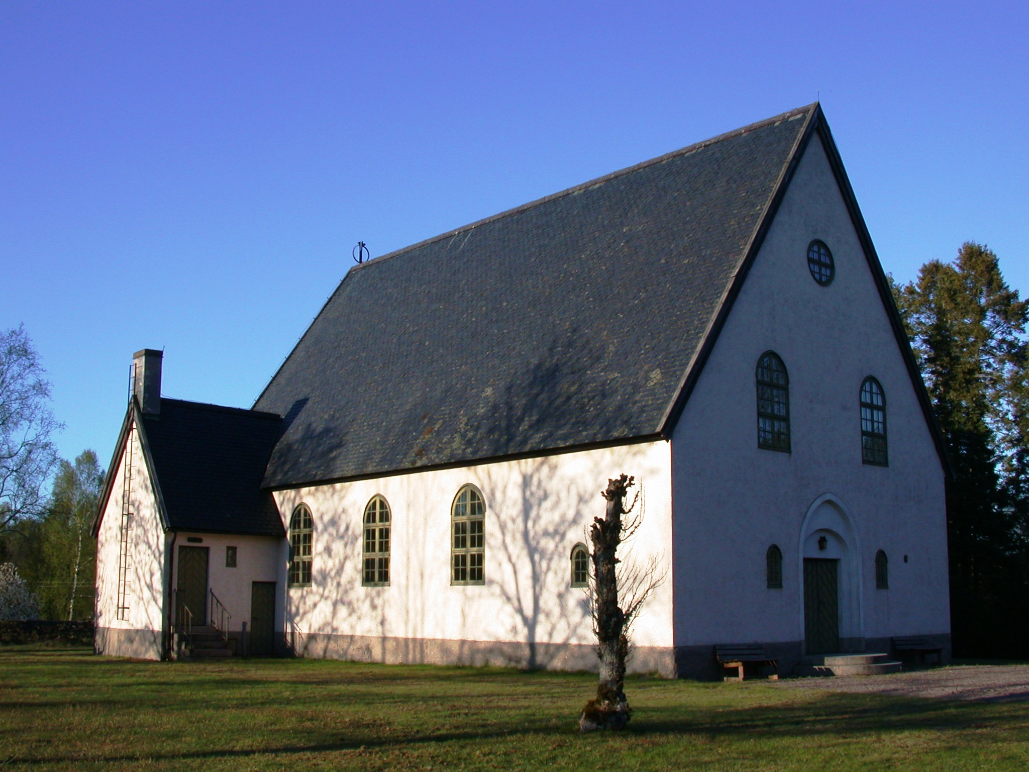 Flemmingeland chapel, Nybro, Sweden